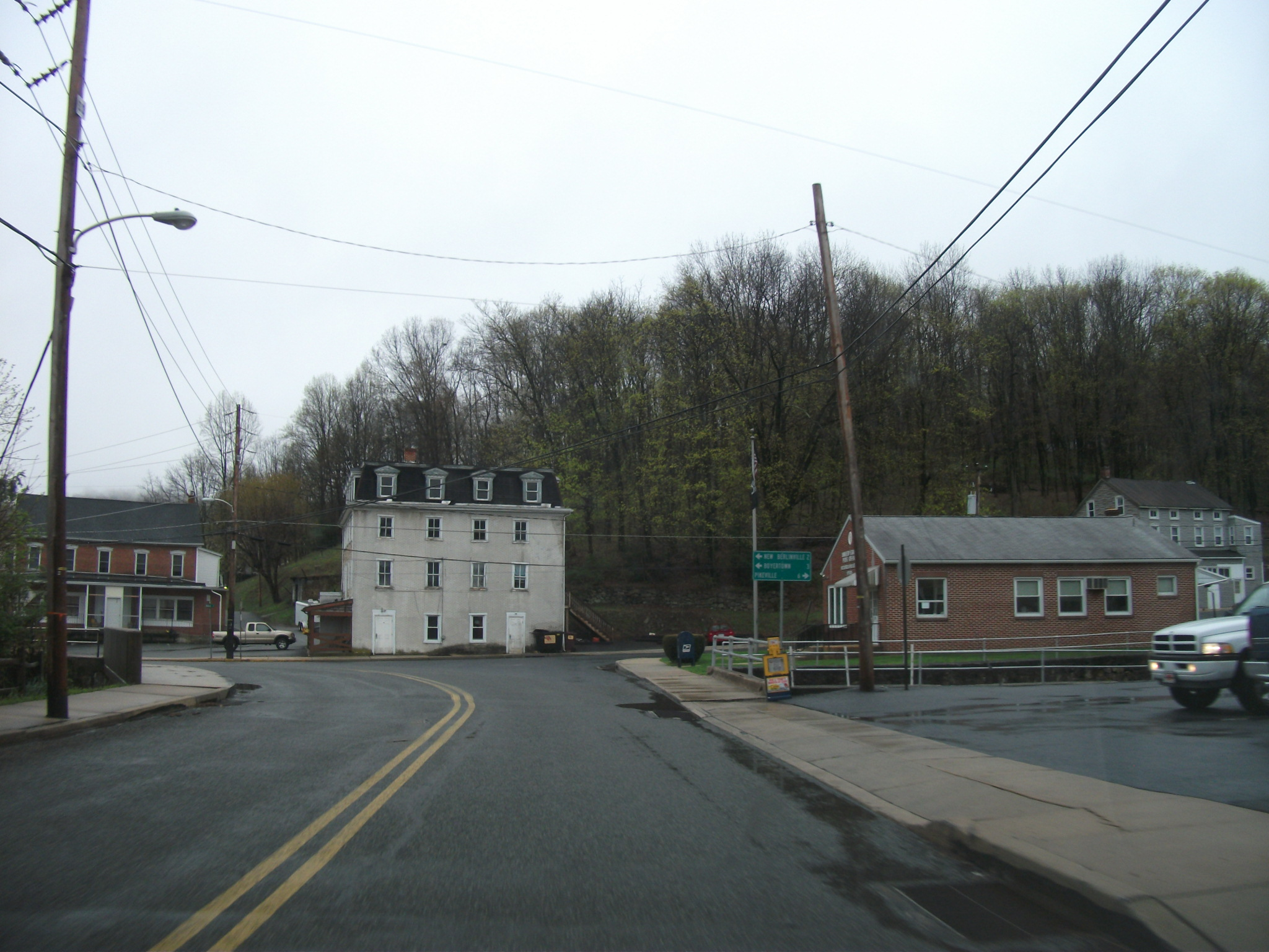 Old Pennsylvania State Route 100 in Bechtelsville, Pennsylvania.